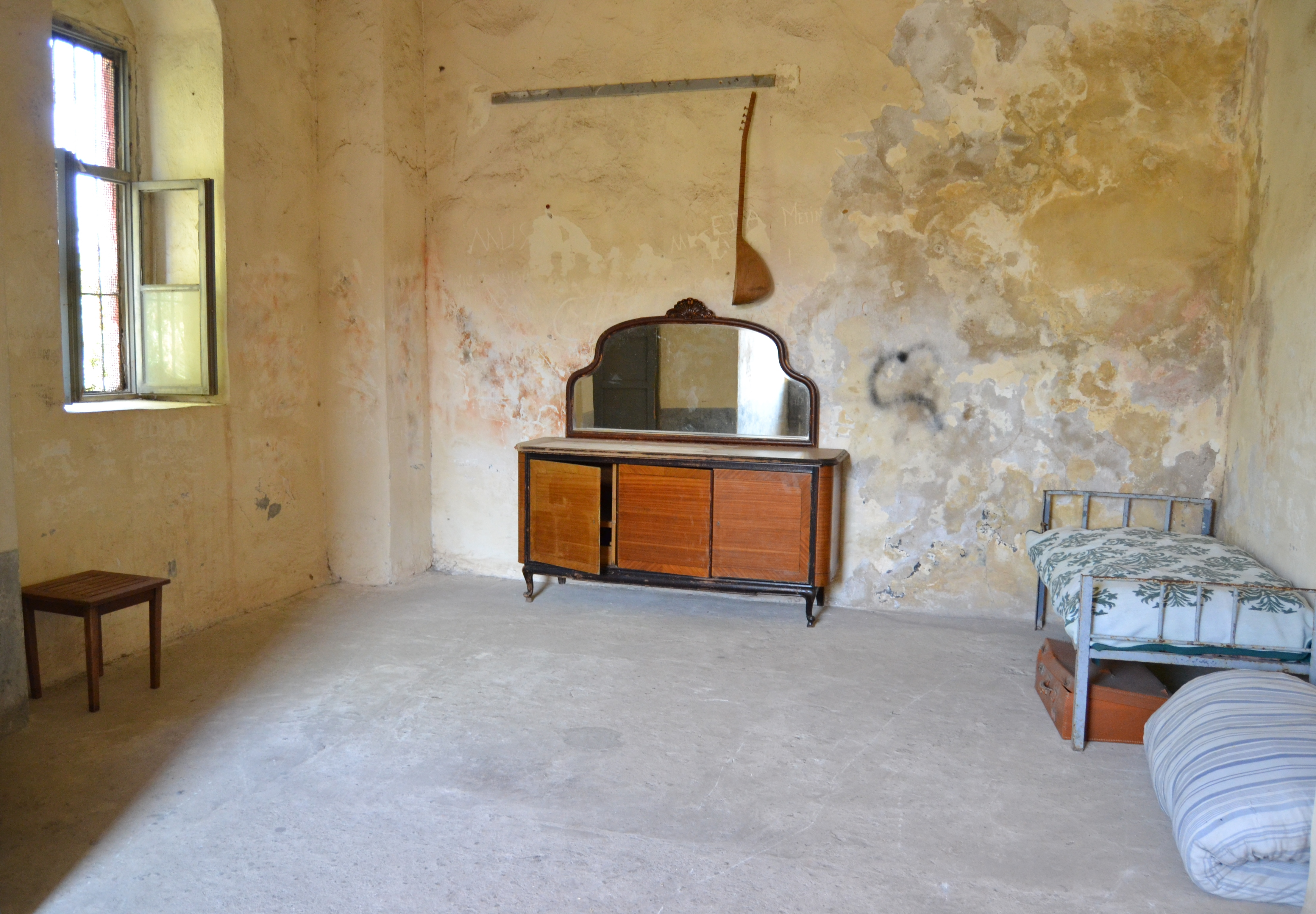 Sabahattin Ali'nin Sinop Cezaevinde kaldığı koğuşu.